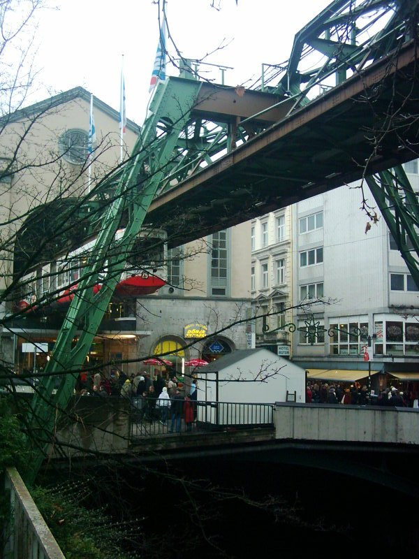 Wupperbrücke Alte Freiheit